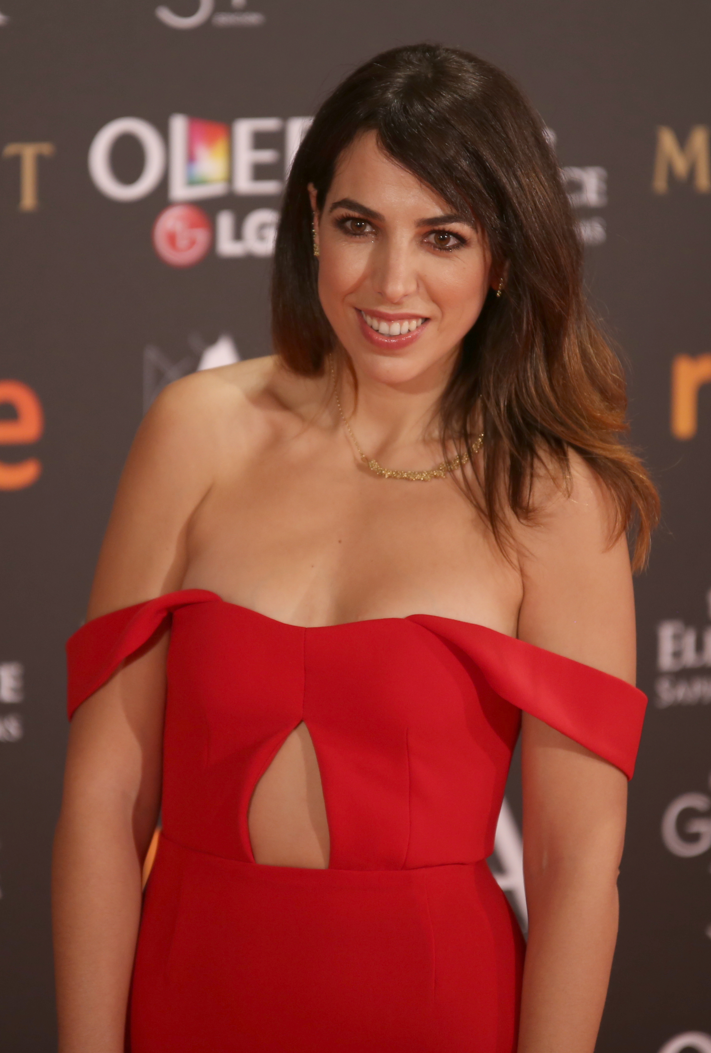 Alicia Rubio en los Premios Goya 2017